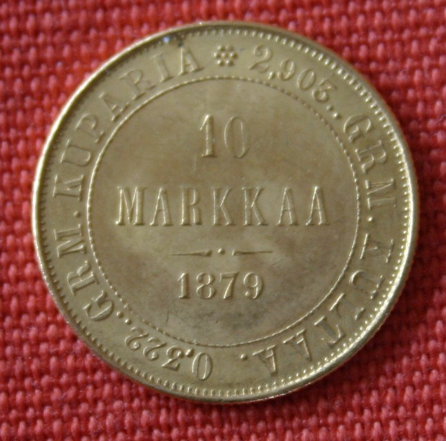 10 Markkaa Münze von 1879